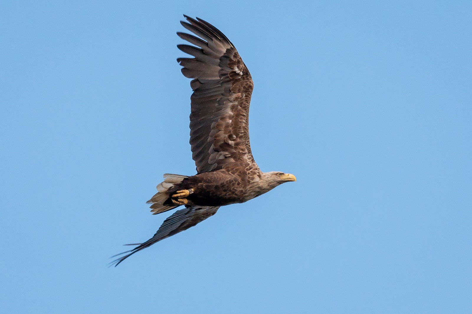 Merikotka Laupuksensalmen luonnonsuojelualueella